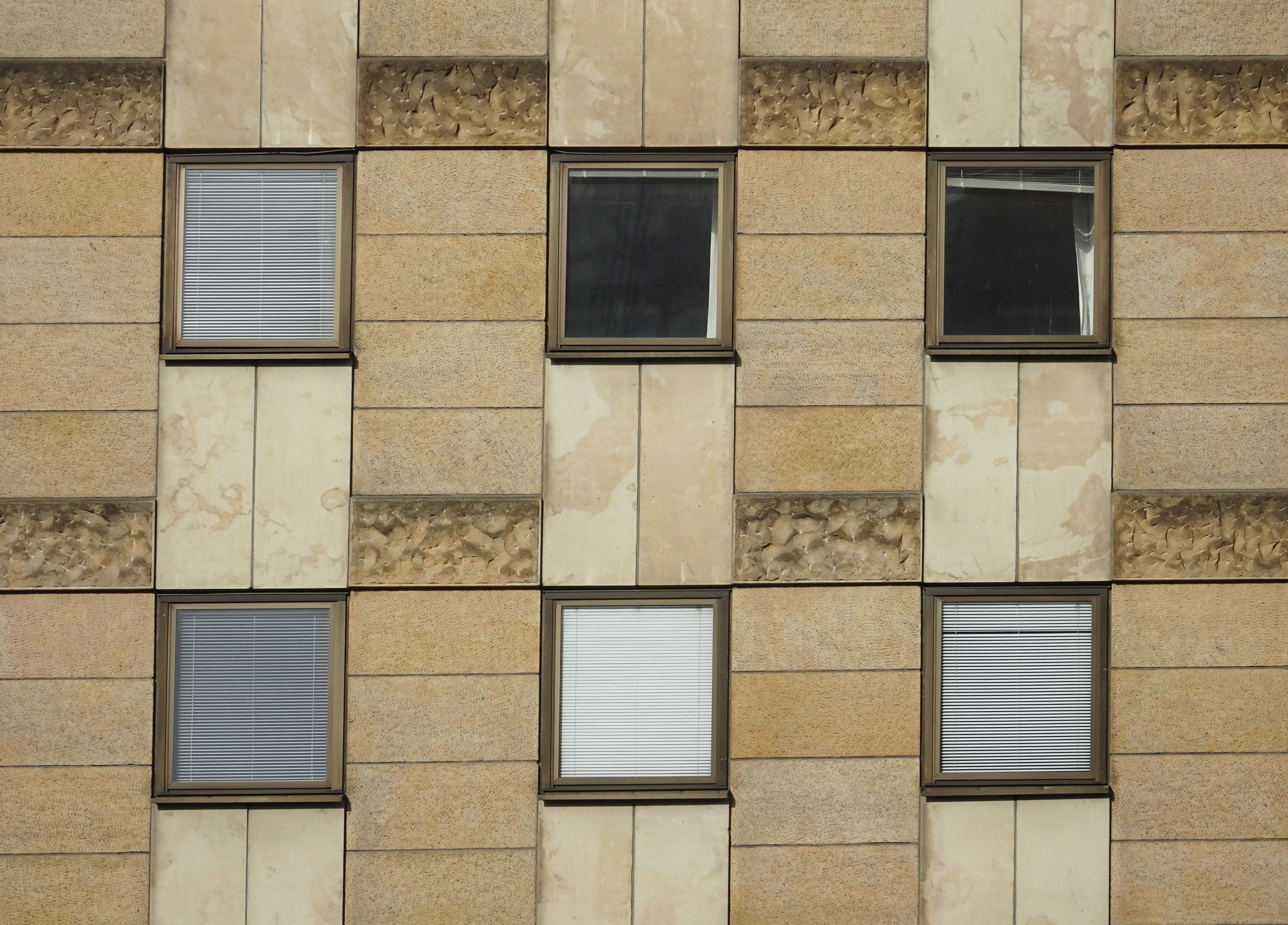 Kontorsfastigheten Snäckan 8 (Tegelbacken 4) byggt 1970-72. Arkitekt Erik Thelaus.